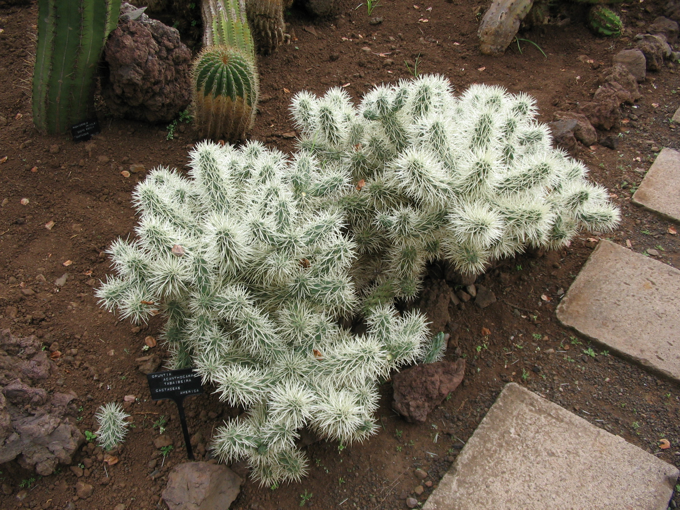 Opuntia acanthocarpa tabaibeira (botanikus kert, Funchal)